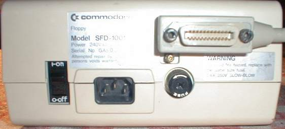 Commodore SFD 1001 Disk Drive